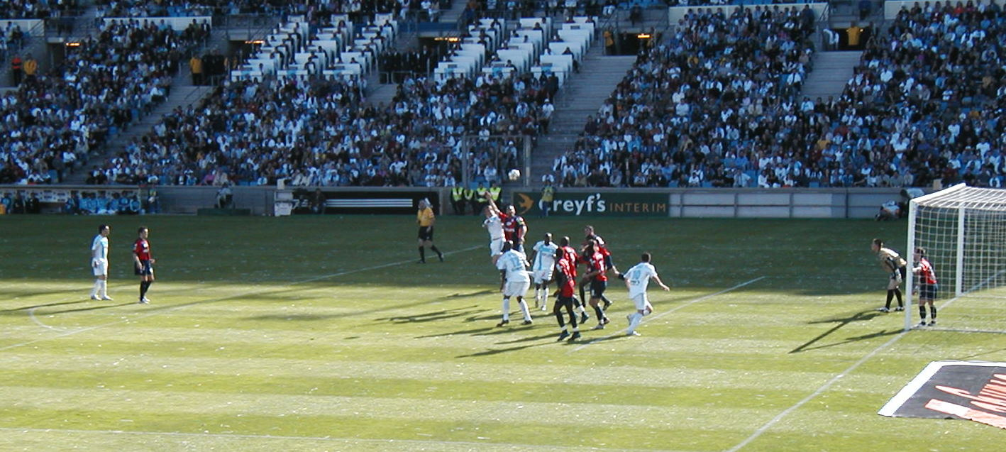 Scène de match du Championnat de France de football 2004-2005 entre l'Olympique de Marseille et le SM Caen.